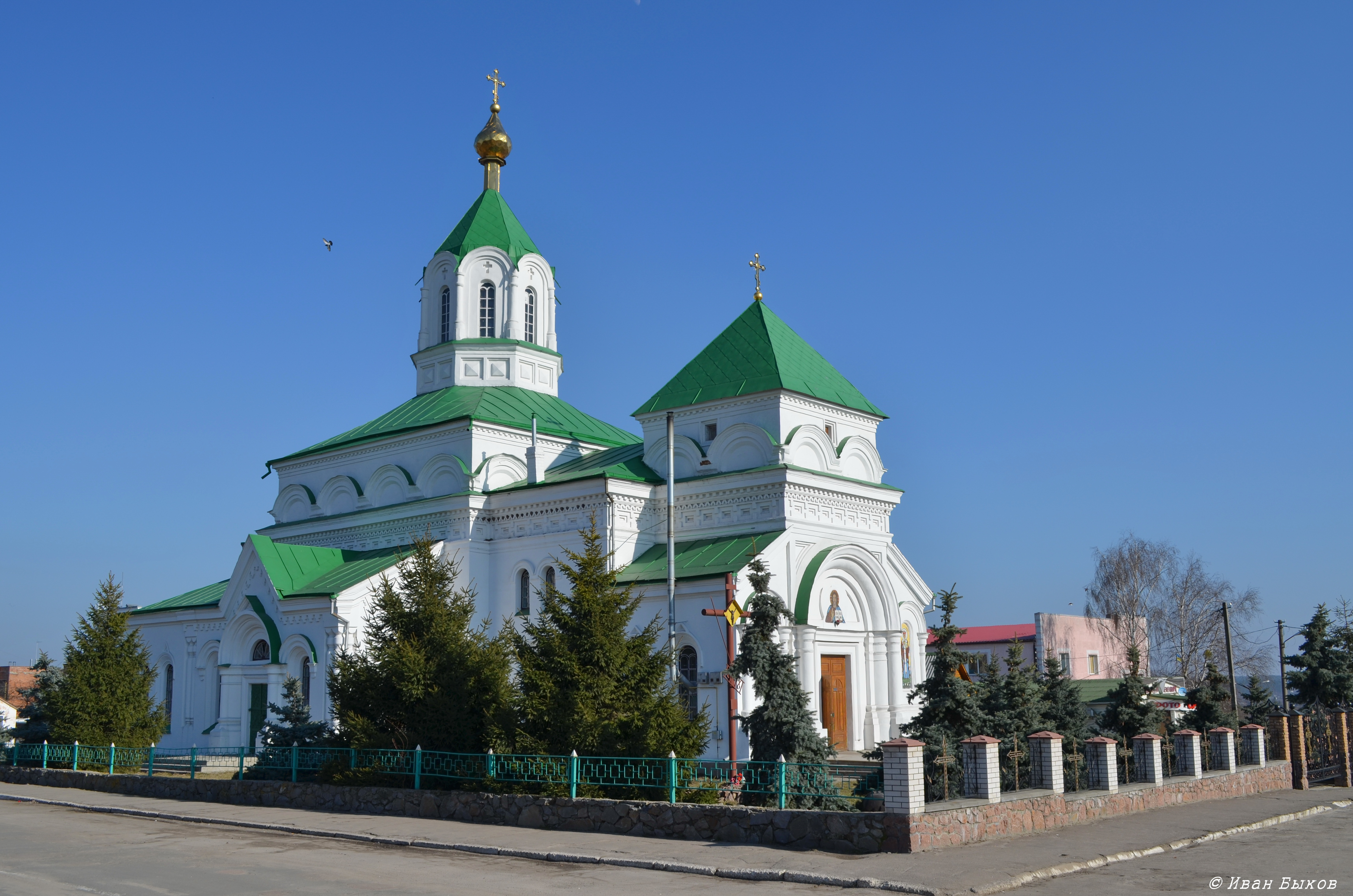 Радомишль. Миколаївський собор. 1864-83 рр.